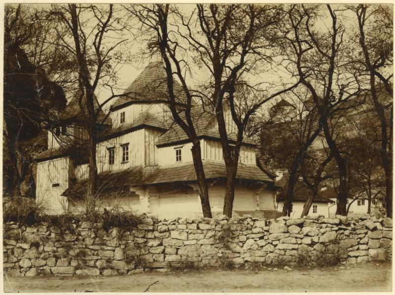 Церква Хрестовоздвиженська: Церква Хрестовоздвиженська в Камянці Подільському